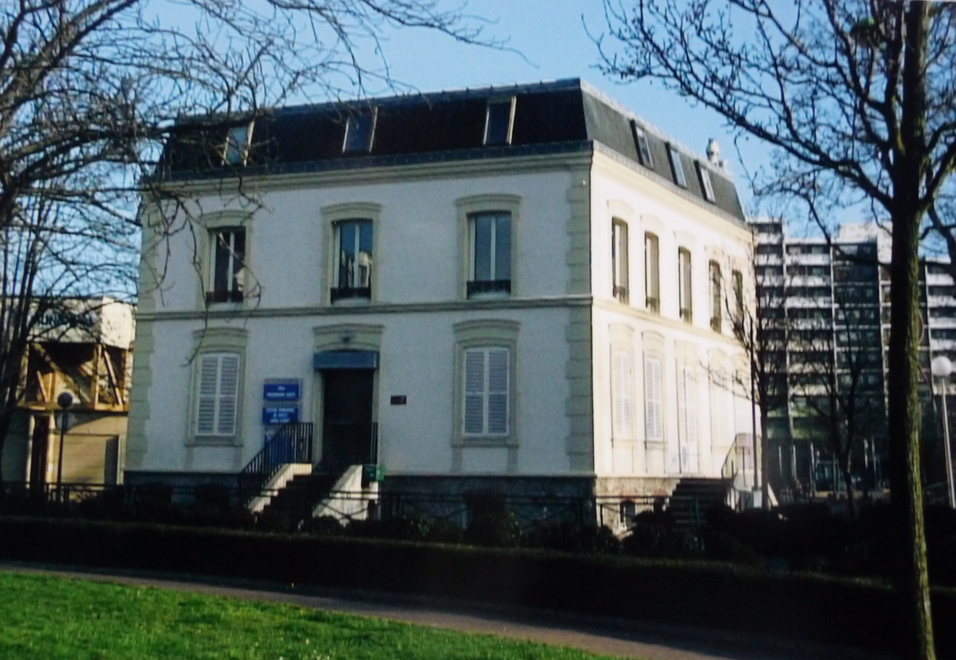 Anciennement maison des sœurs de Saint Vincent de Paul